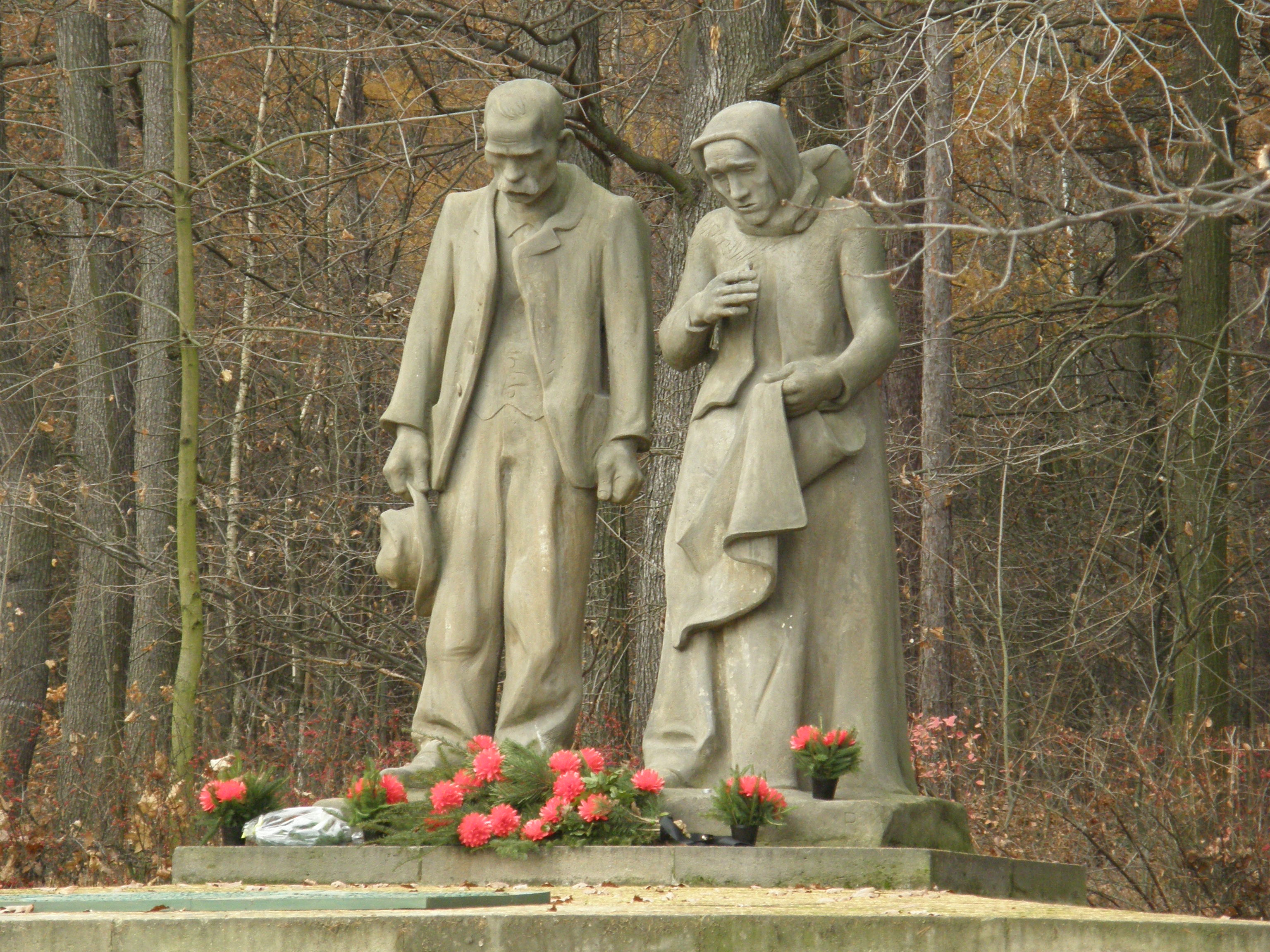 Pomník obětem katastrofy na dole Nelson III. Autorem Karel Pokorný, instalováno v r. 1935